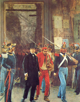 "Carlo Poerio condotto all'ergastolo" di Nicola Parisi, Napoli, Museo di San Martino vedi Carmelo Cipriani ,"Percorsi di vita e arte: Francesco Saverio Altamura e i pittori risorgimentali di Capitanata", Studi Bitontini, 2012, n. 93-94 - Dipinto premiato alla Esposizione universale di Vienna 1873